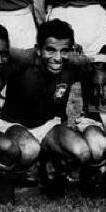 Brazil - World Cup Winner 1958 Vicente Feola (coach), Djalma Santos, Zito, Bellini, Nilton Santos, Orlando, Gylmar -Garrincha, Didi, Pelé, Vava, Zagallo.